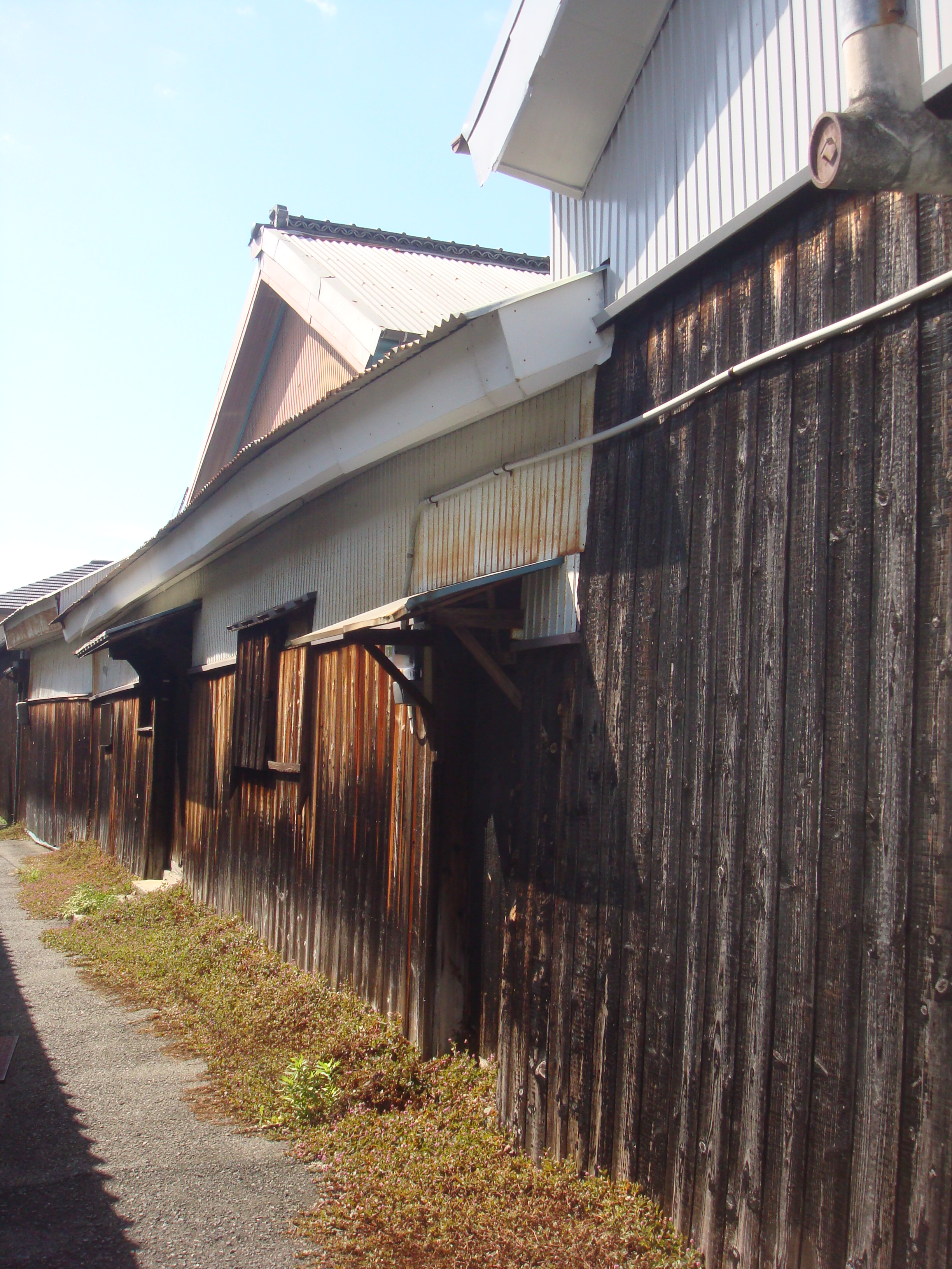 西海酒造の裏側